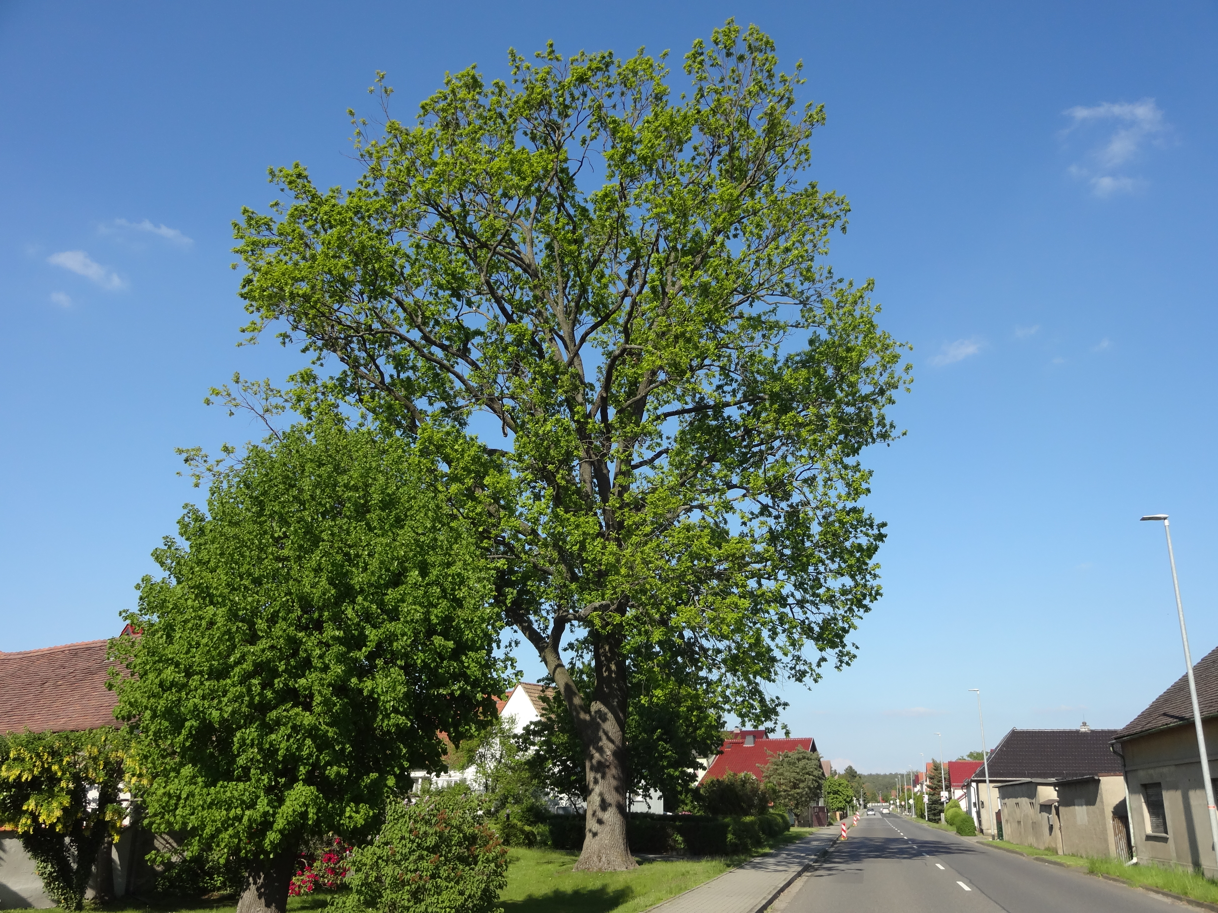 als Naturdenkmal geschützte Stieleiche vor der Hauptstraße 10 in Grünewald